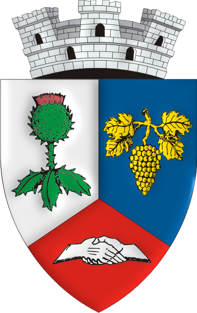 Coat of arms of Boldești-Scăeni, Romania